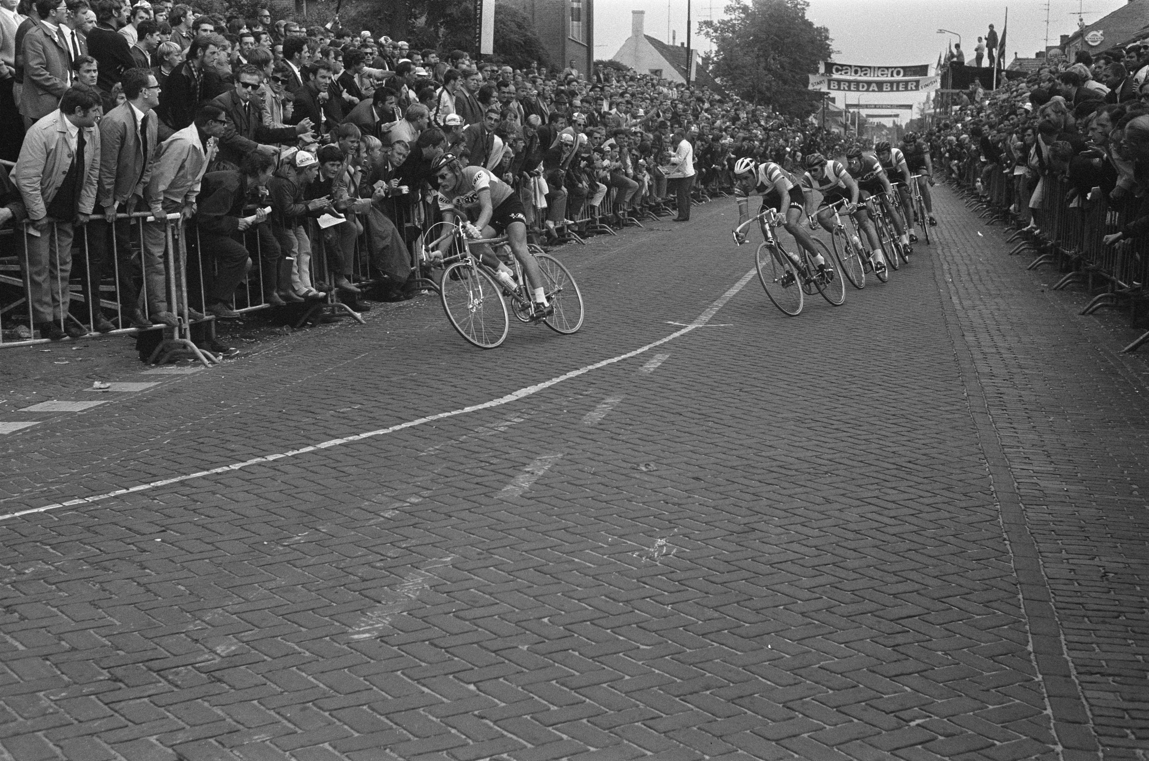 Collectie / Archief : Fotocollectie Anefo Reportage / Serie : [ onbekend ] Beschrijving : Wielrennen: Acht van Chaam Datum : 22 juli 1970 Trefwoorden : Wielrennen Persoonsnaam : Acht van Chaam Fotograaf : Koch, Eric / Anefo Auteursrechthebbende : Nationaal Archief Materiaalsoort : Negatief (zwart/wit) Nummer archiefinventaris : bekijk toegang 2.24.01.05 Bestanddeelnummer : 923-6922